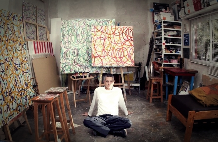 Alejandro Thornton